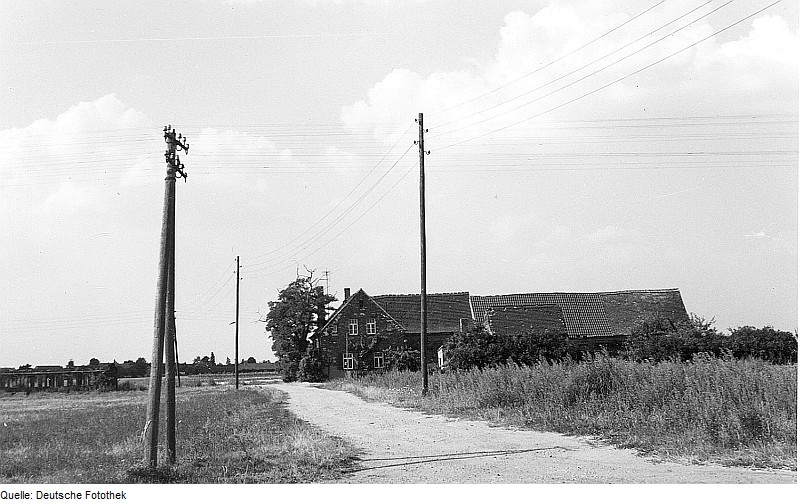 Original image description from the Deutsche Fotothek Doberschütz-Mensdorf. Ehem. Windmühlengehöft, Dorfstraße 11